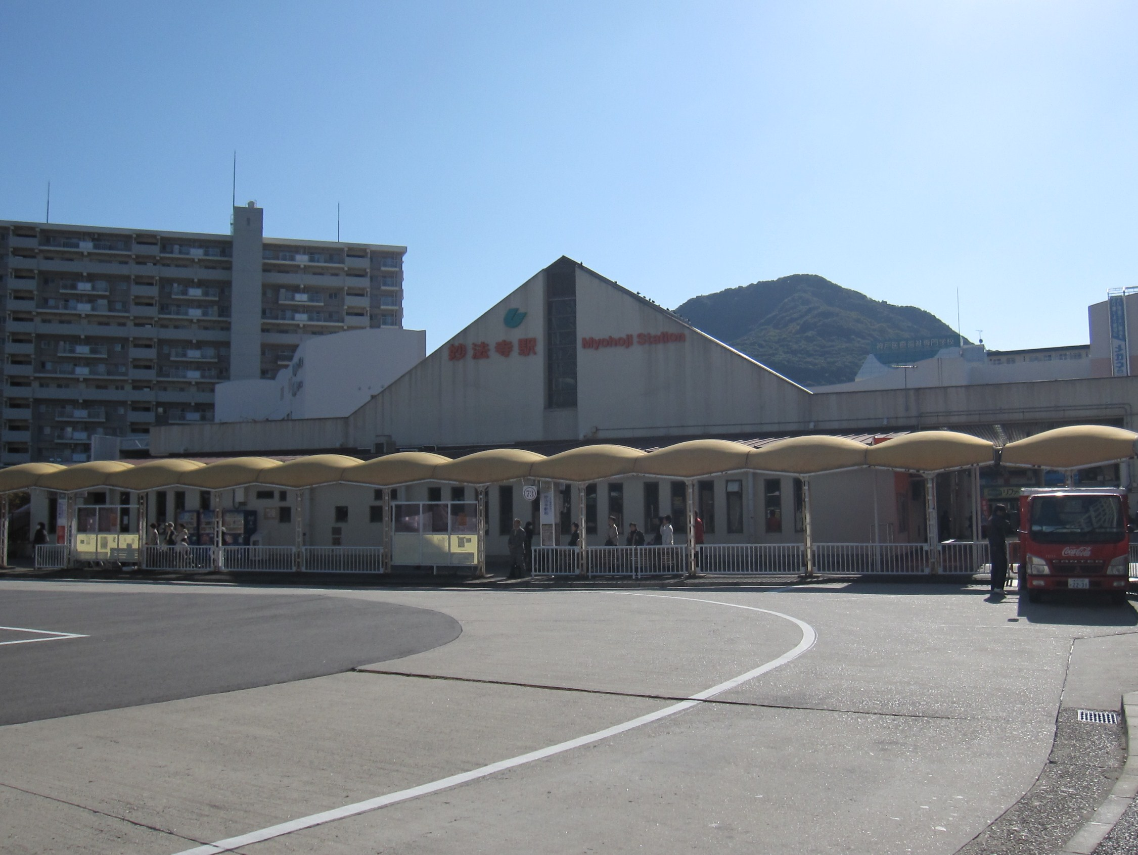 神戸市営地下鉄妙法寺駅